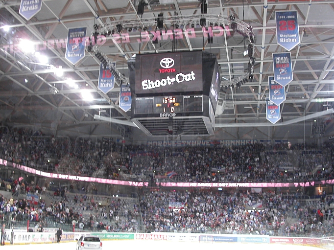 Meisterschaftswimpel der Adler Mannheim in der SAP Arena